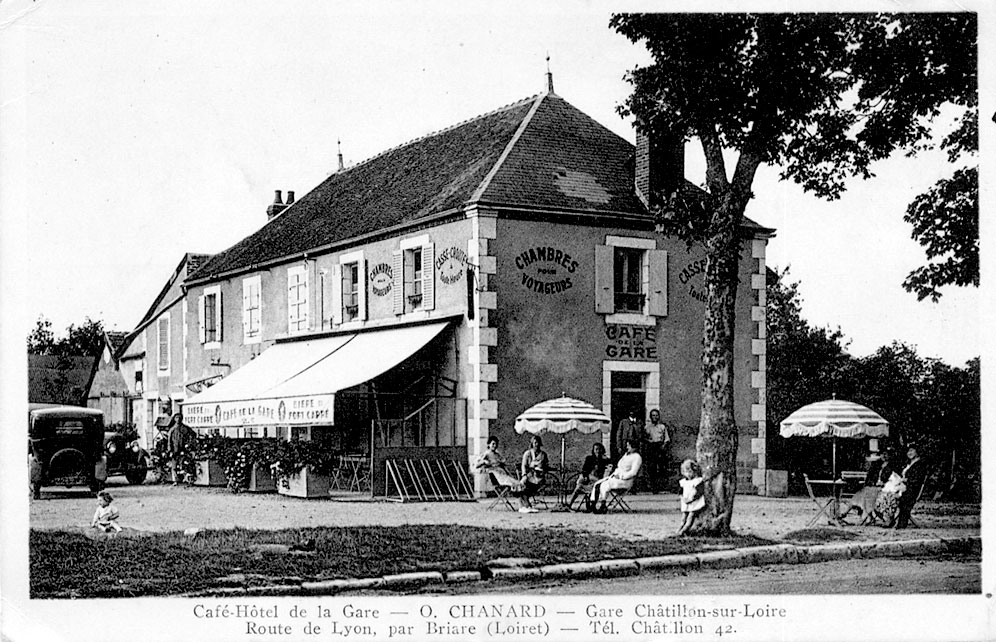 Café-Hôtel de la Gare, Châtillon-sur-Loire, Loiret, France